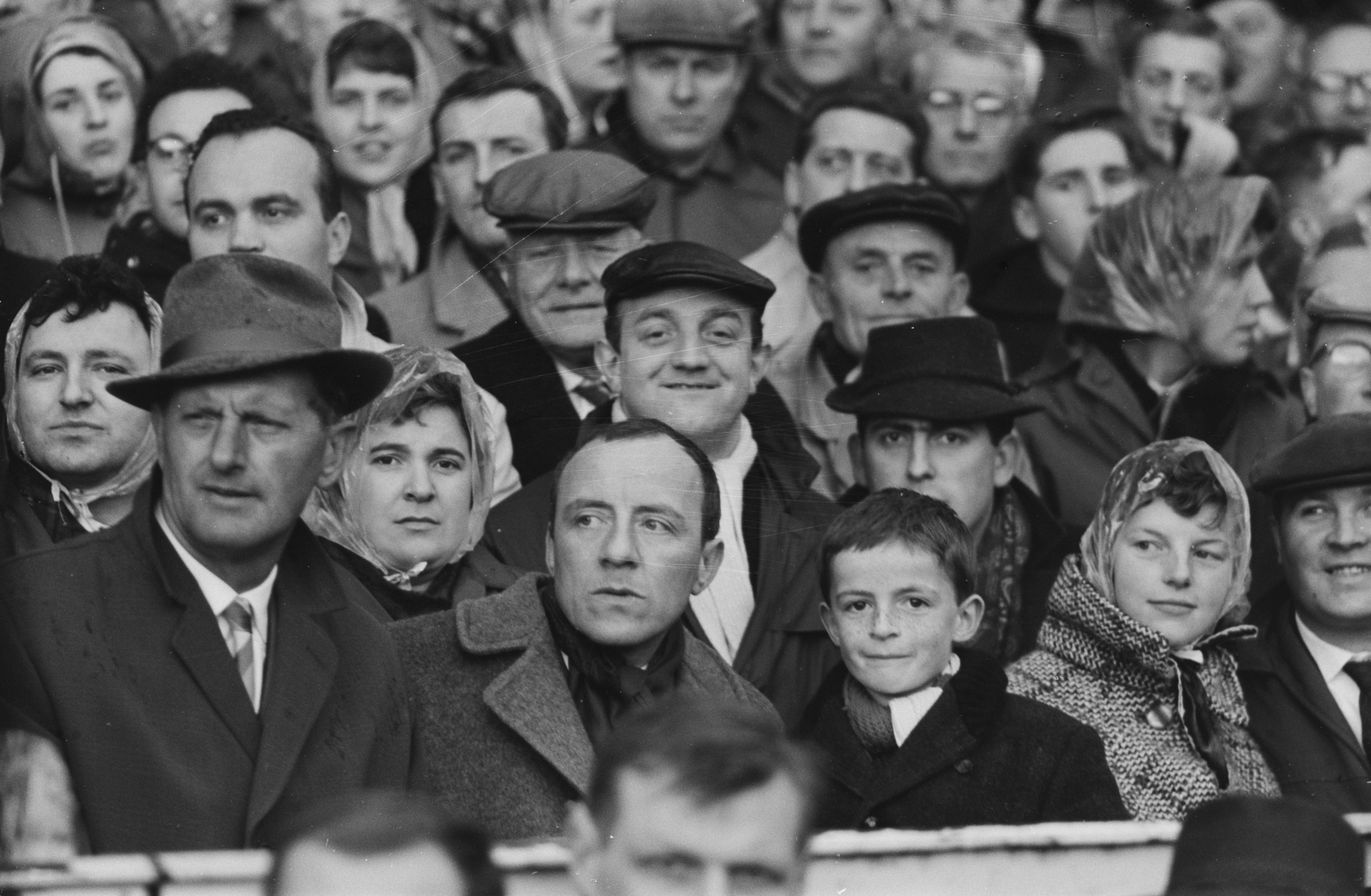 Collectie / Archief : Fotocollectie Anefo Reportage / Serie : [ onbekend ] Beschrijving : Belgie tegen Nederland. In het publiek Johnny Kraaijkamp met zoon Johnny Jr. Datum : 1 april 1962 Trefwoorden : sport, tribunes, voetbal Persoonsnaam : Kraaijkamp, Johnny (jr.), Kraaijkamp, Johnny (sr.) Fotograaf : Pot, Harry / Anefo, [onbekend] Auteursrechthebbende : Nationaal Archief Materiaalsoort : Negatief (zwart/wit) Nummer archiefinventaris : bekijk toegang 2.24.01.05 Bestanddeelnummer : 913-7148